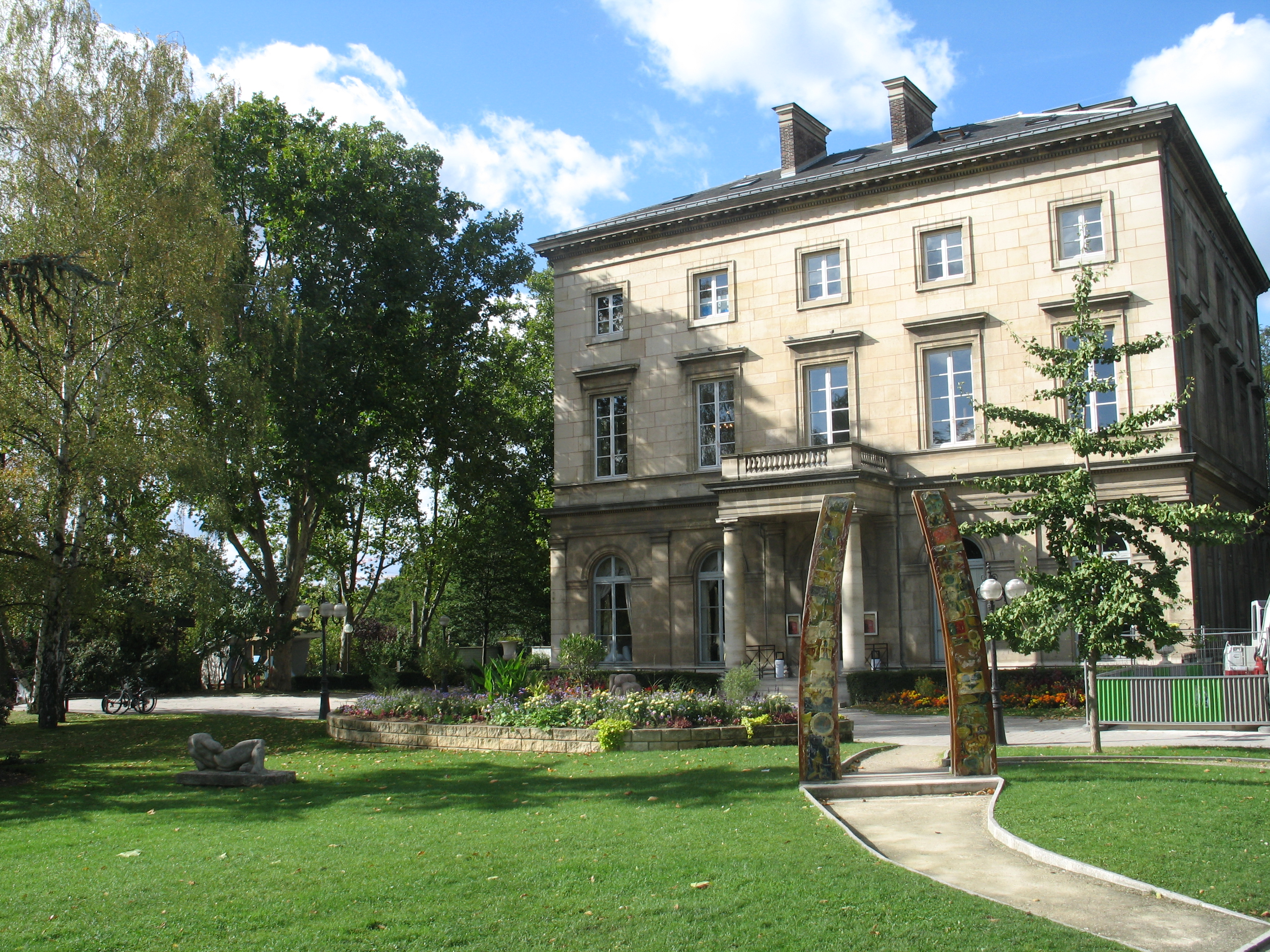 Château de Saint-Ouen